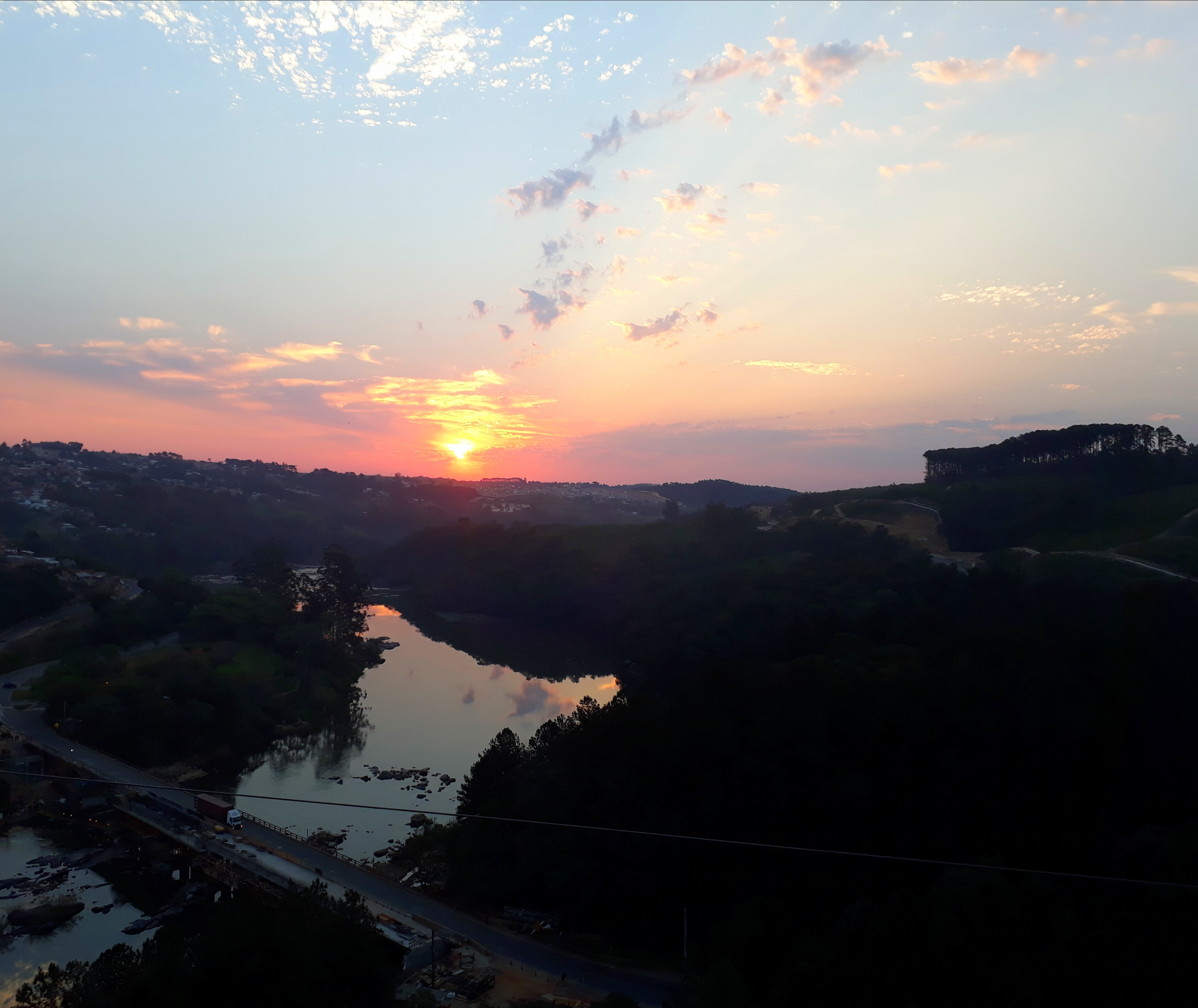 Vista do Parque Municipal do Rio Tibagi e a ponte em Telêmaco Borba, no Paraná.